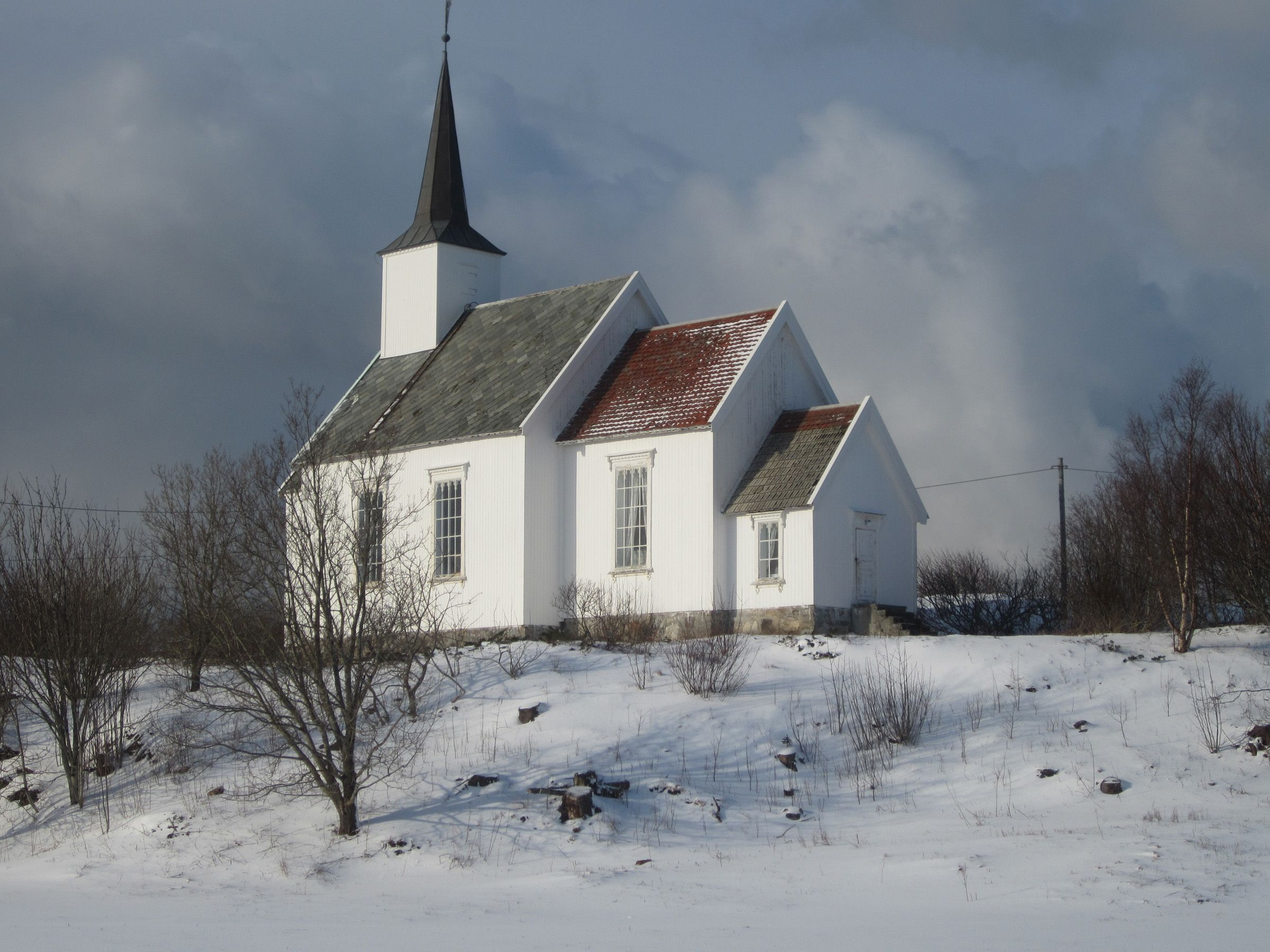 Skålvær kirke. Foto: Arnt L. Johansen. Fra Riksantikvarens Kulturminnesøk.